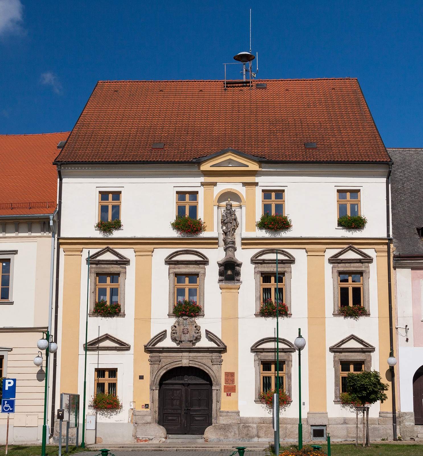 Radnice (Bor), nám. 1, Bor